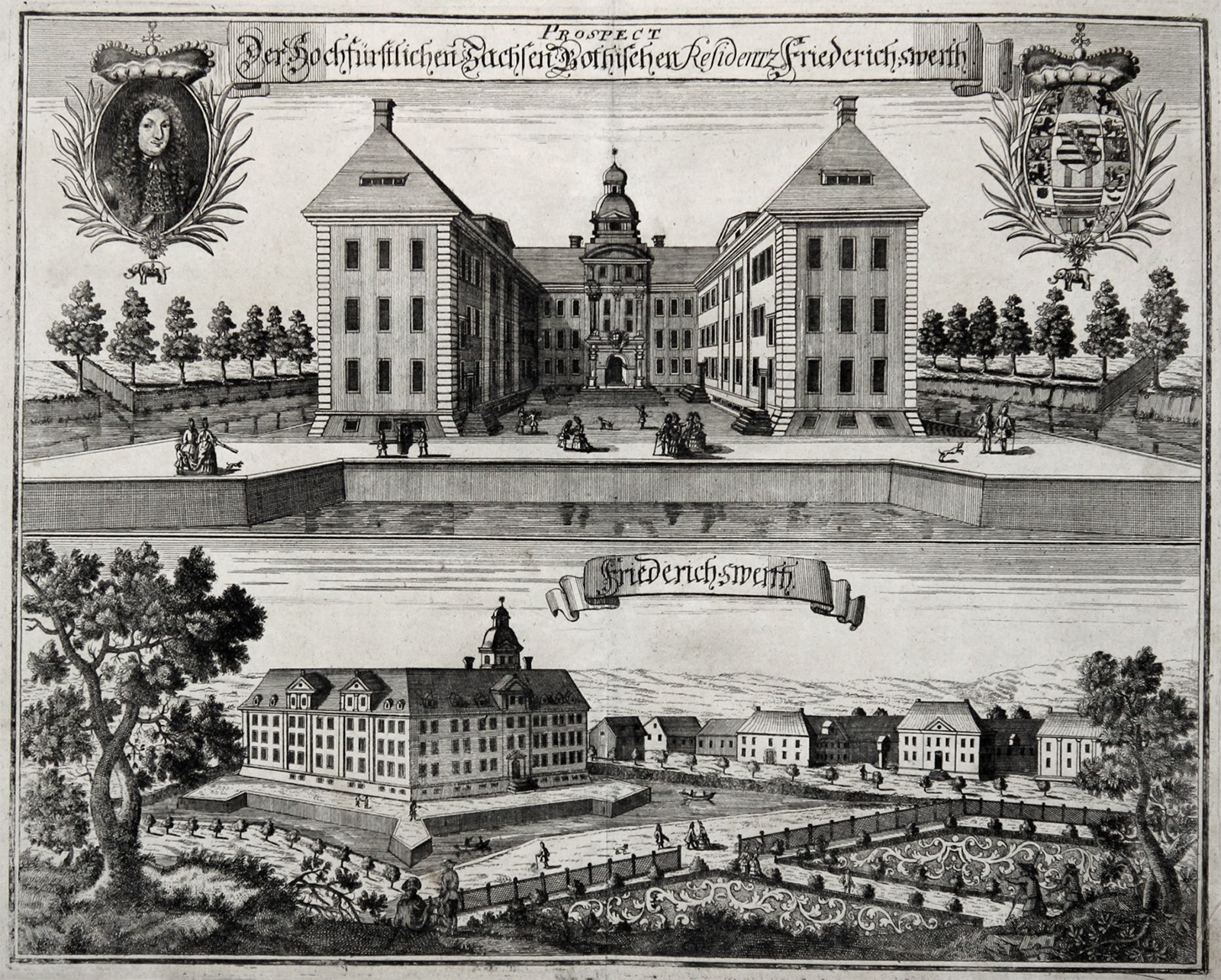 Schloss Friedrichswerth, Kupferstich von 1717 aus "Gotha Diplomatica"